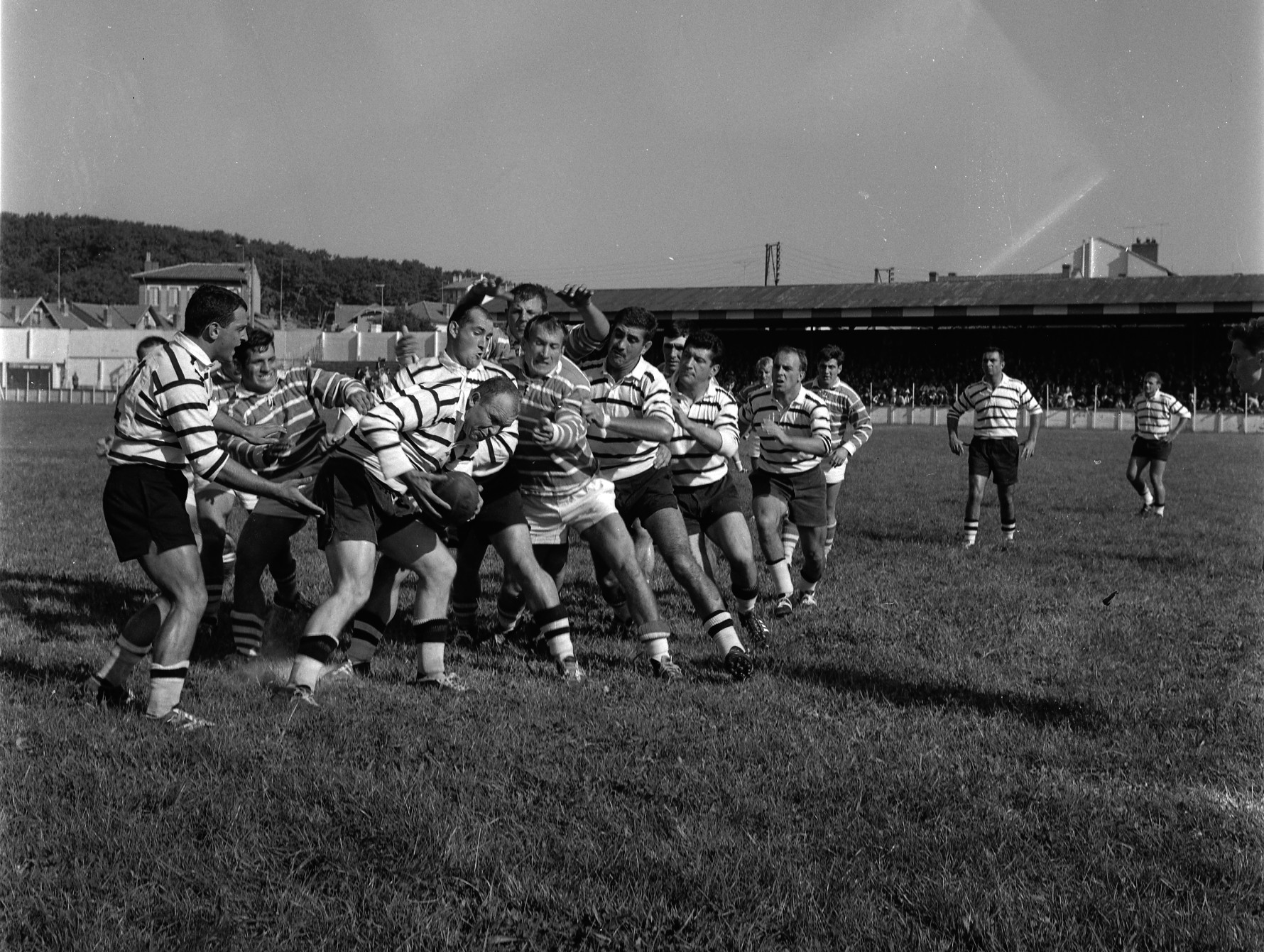 Stade du TOEC. Le 7 Octobre 1962. Vue d'une phase de jeu entre le TOEC et Brive.